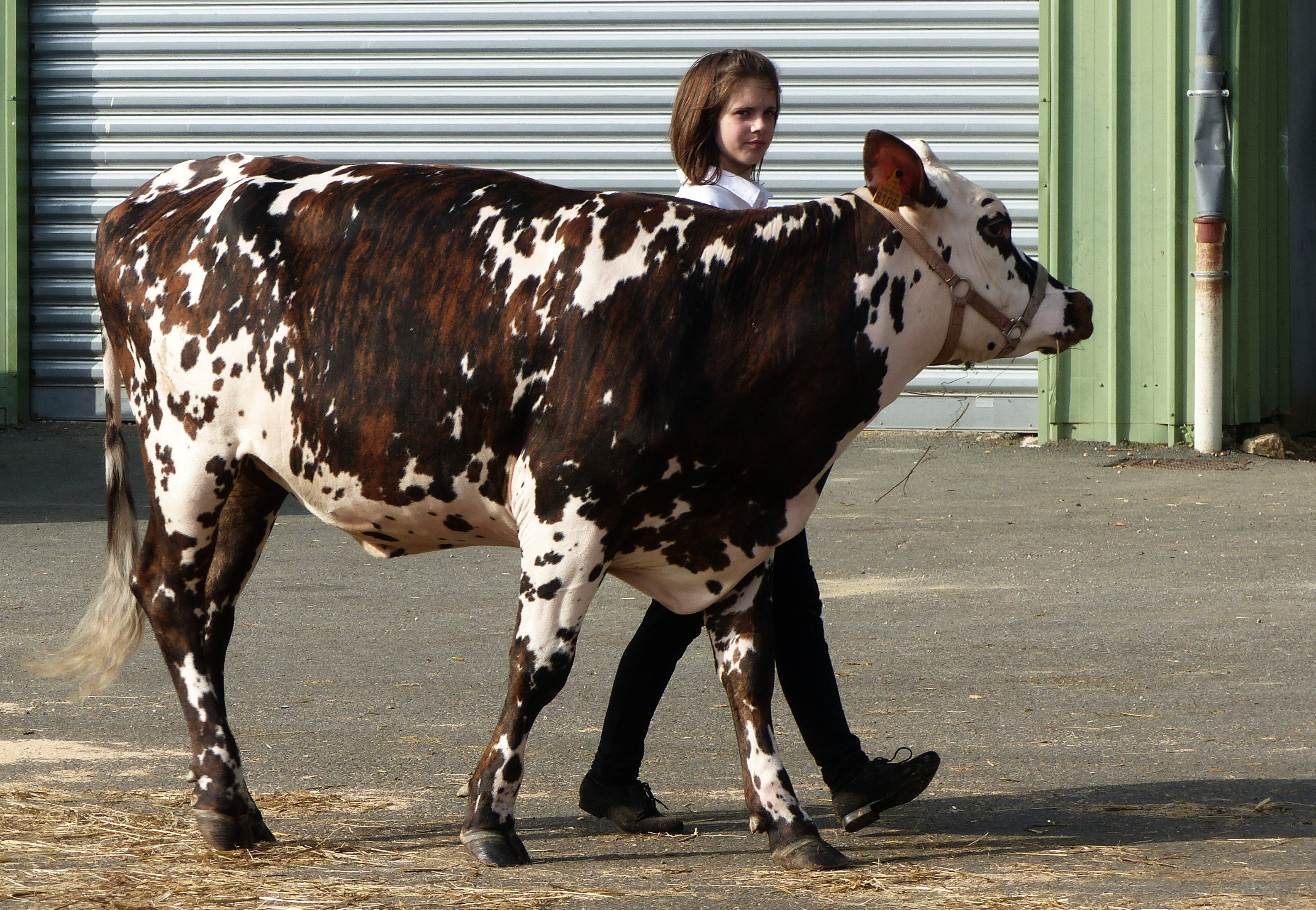 Vache de race Normande au concours bovin Ohh la Vache 2017, Pontivy.